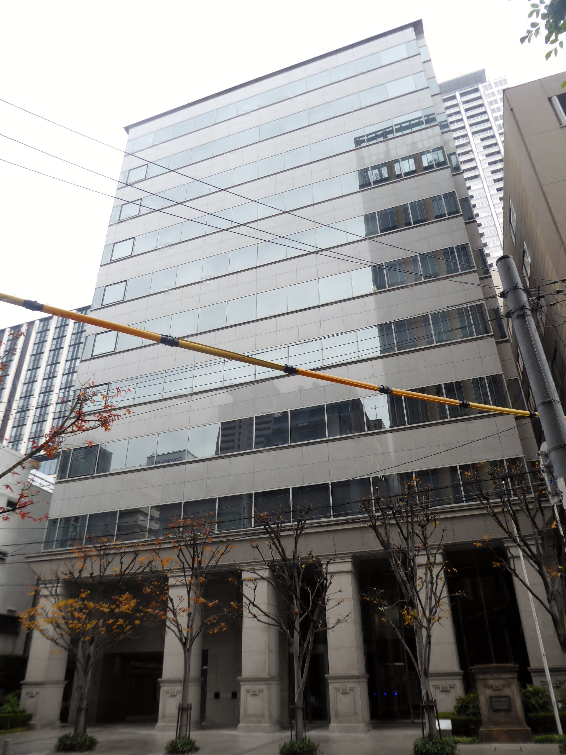 塩野義製薬株式会社本社を撮影。 Panasonic Lumix DMC-TZ60